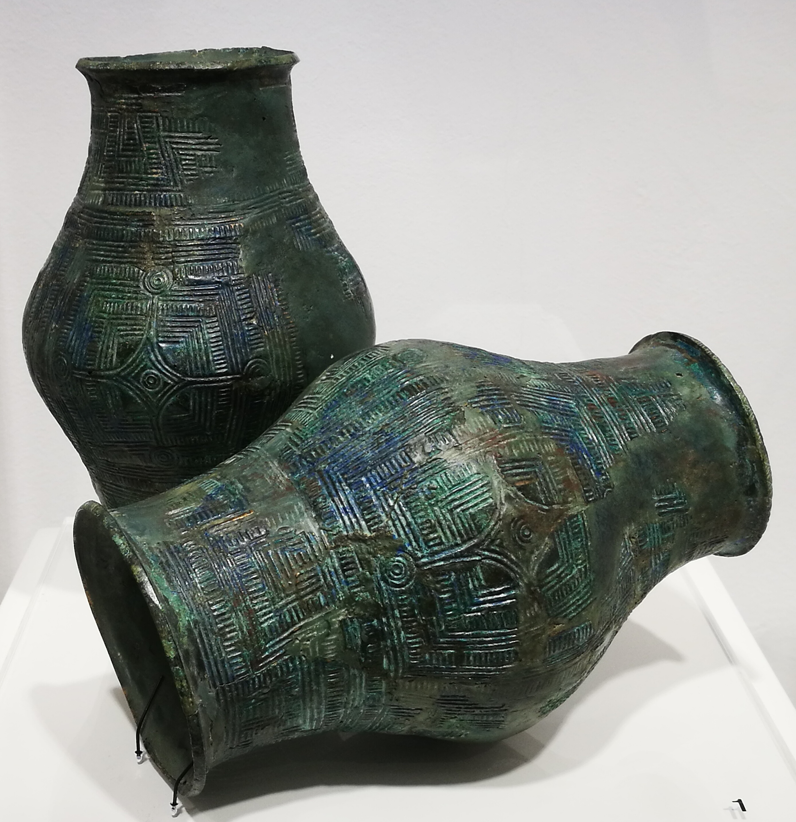 Deutschland (D) - Baden-Württemberg (BW) - Landkreis Konstanz (KN) - Singen - Archäologisches Hegau-Museum:Tonnenarmreifen, Mauenheim, ca. 500 v. Chr.Mit Genehmigung durch Herrn Ralph Stephan M.A., MuseumsleitungHegau-Museum SingenAm Schlossgarten 2D-78224 Singen